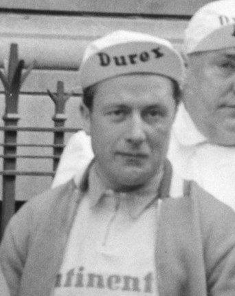 Ronde van Nederland , renners bij start, Continental ploeg (Duitsland) Annotatie De ploeg bestond uit H. Preiskeit, V. Petry. M. Donike, F. Siebert, F. Liebert, P. Schulte, H. Scholl. Ploegleider P. Oszmella